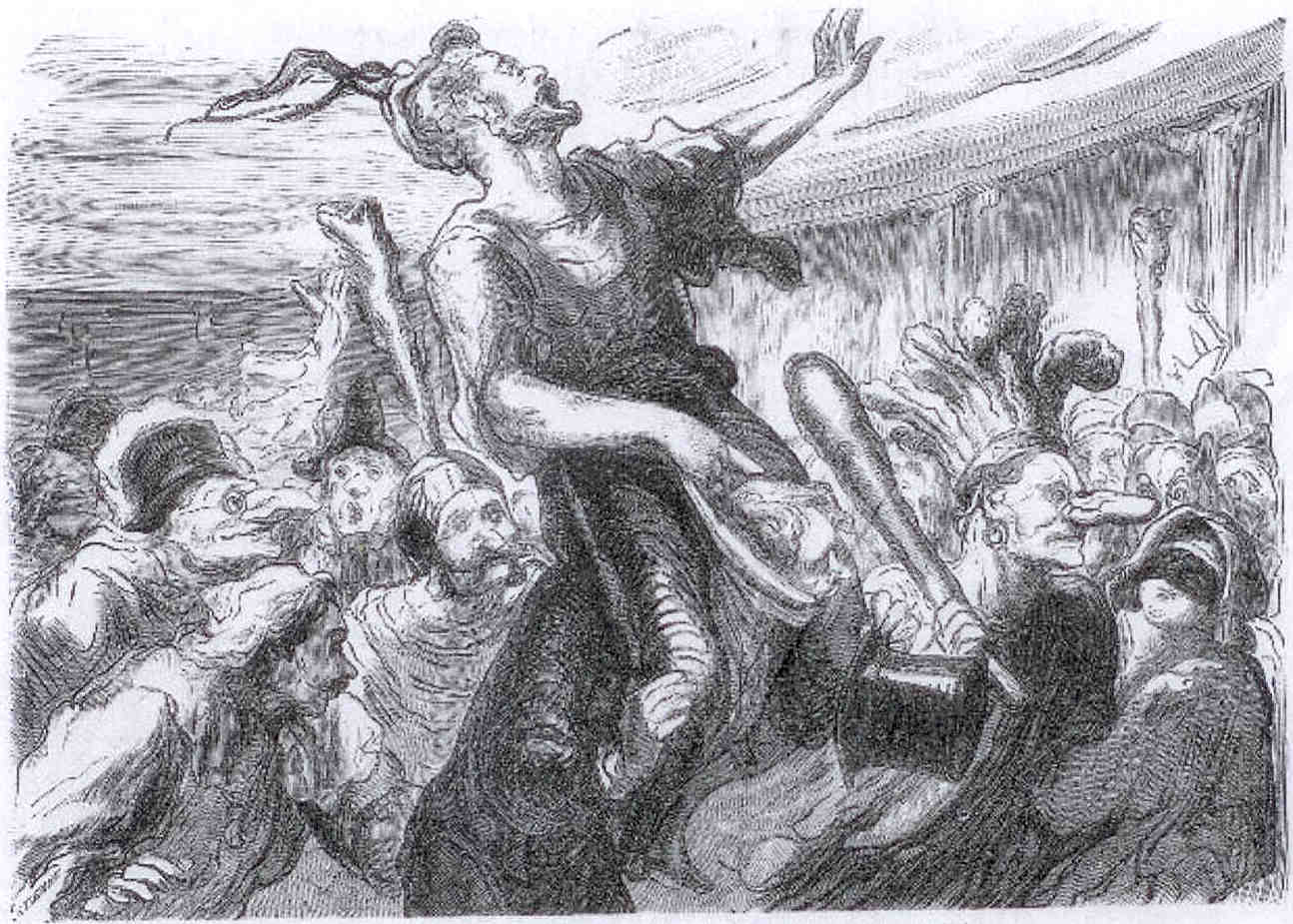 Le défilé de la société des Flambards au bal de l'Opéra lors de la Mi-Carême 1868.